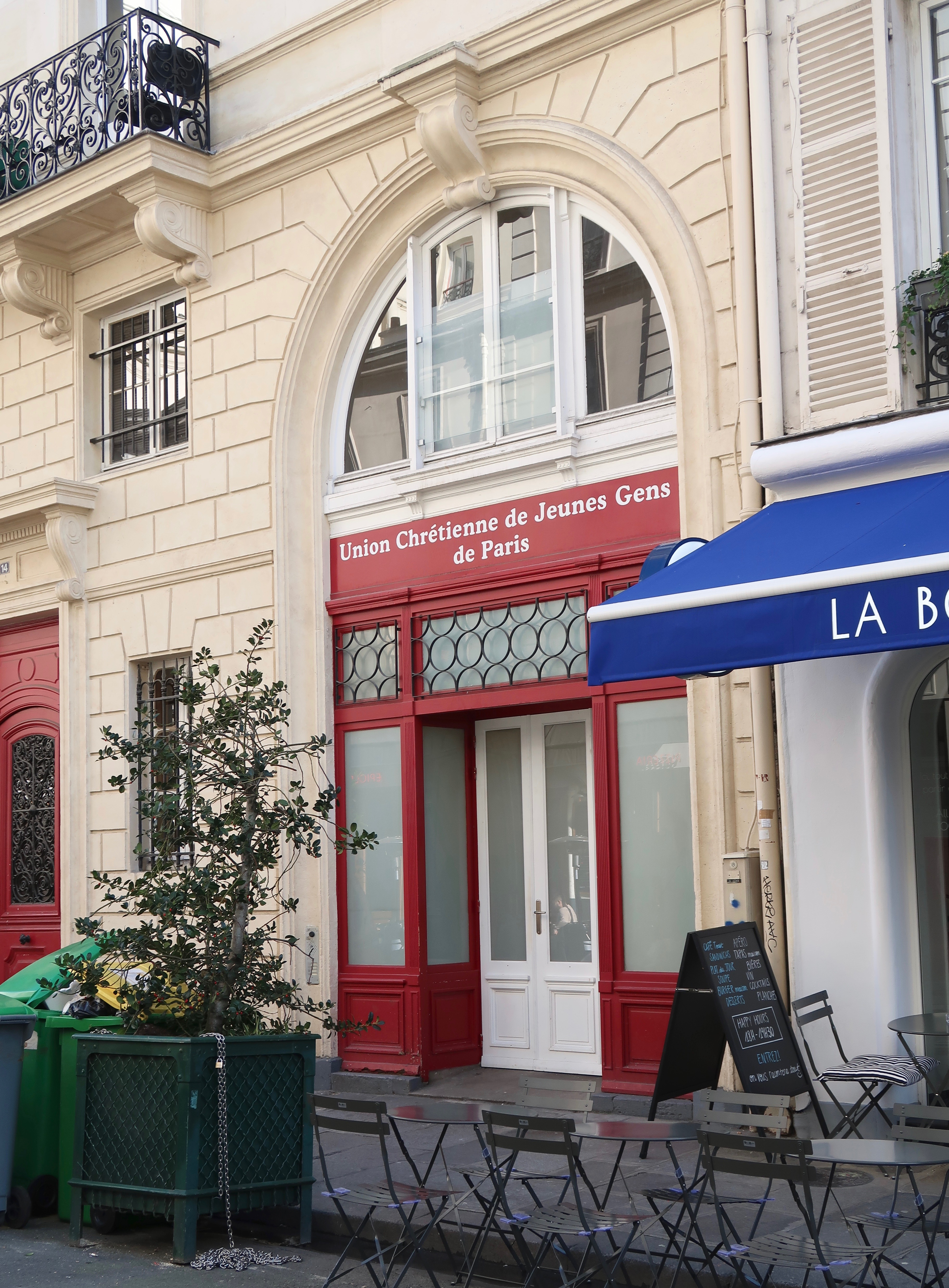 Foyer de l'Union chrétienne des Jeunes Gens de Paris, 14 rue de Trévise (Paris, 9e).